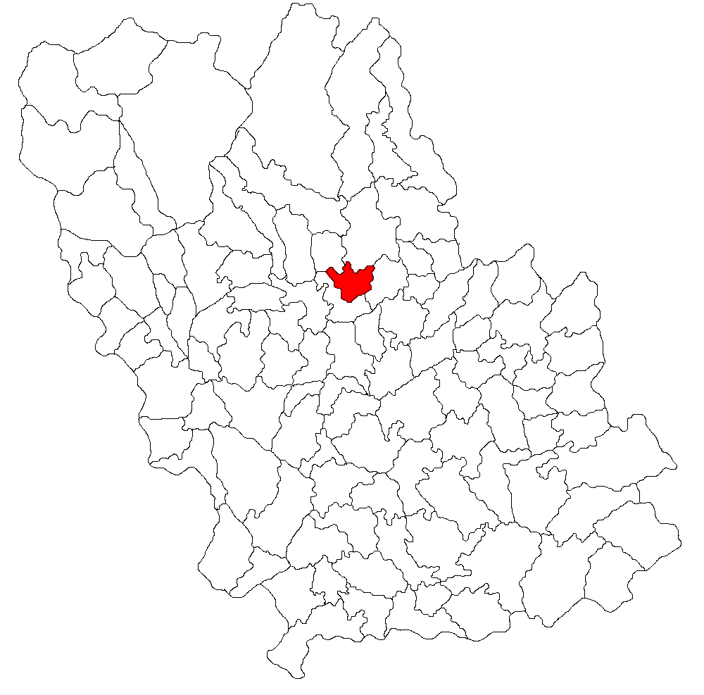 Categorie:Hărţi ale judeţului Prahova